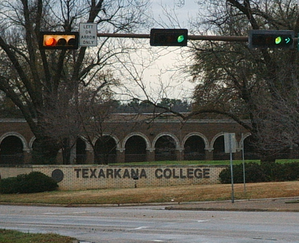 Texarkana College on Robison Road in Texarkana